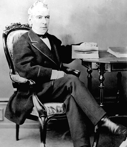 José Joaquín Pérez Mascayano (1801-1889). Presidente de Chile.